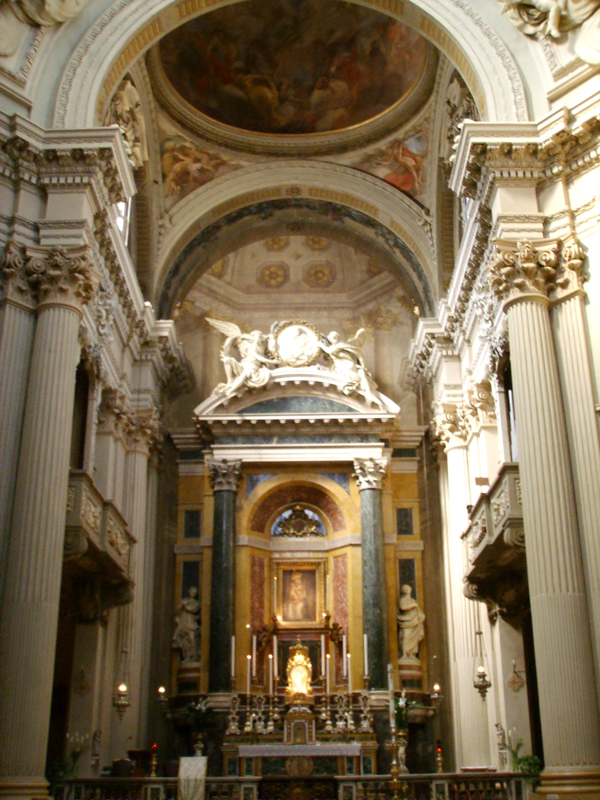 Interno della chiesa di Santa Maria della Vita a Bologna.